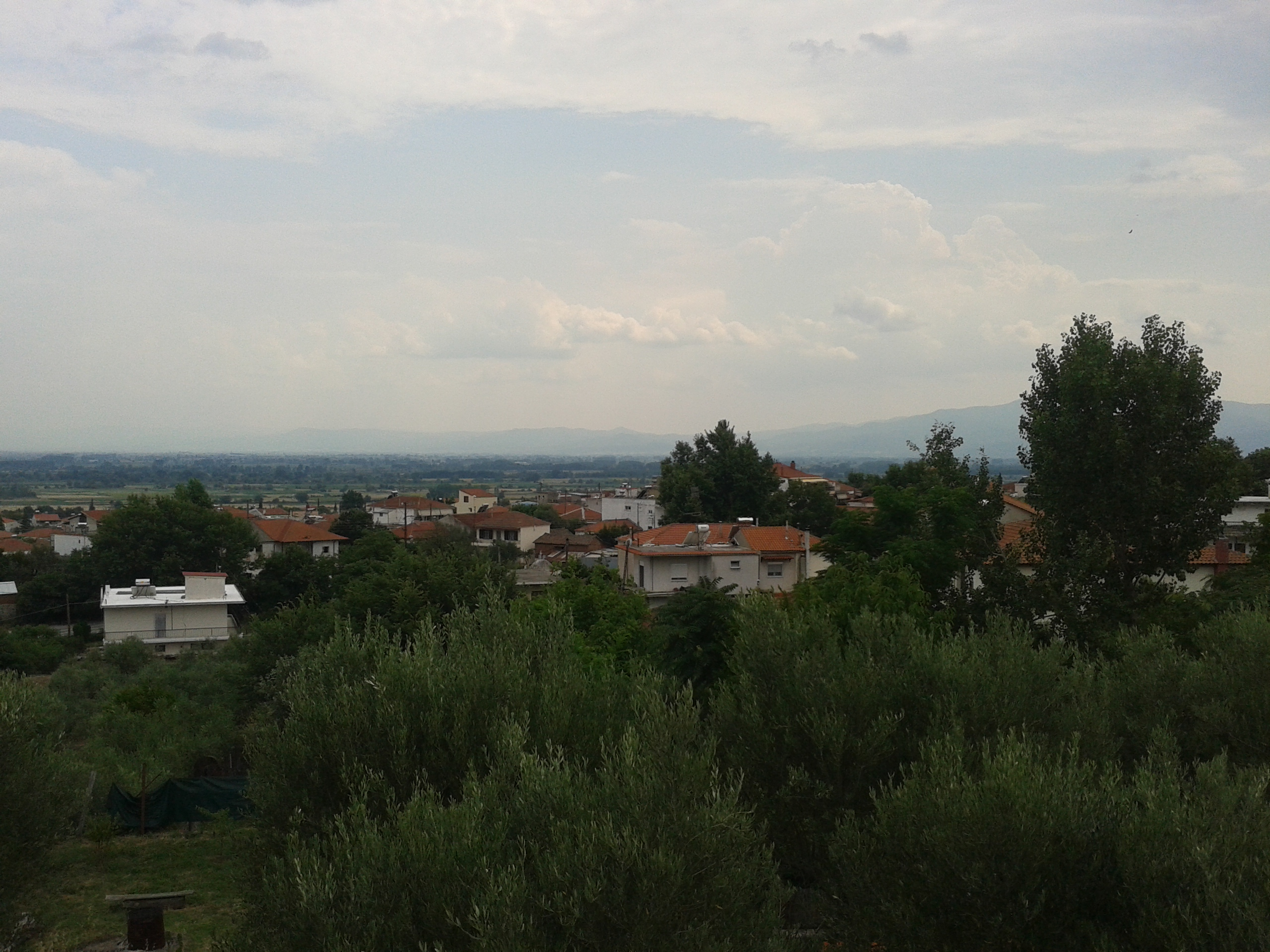 Άποψη του Πετριτσίου από την ακρόπολη.